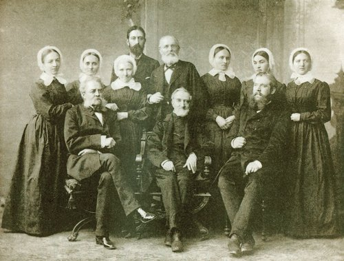 A Németajkú Leányegyház diakonissza nővérei.